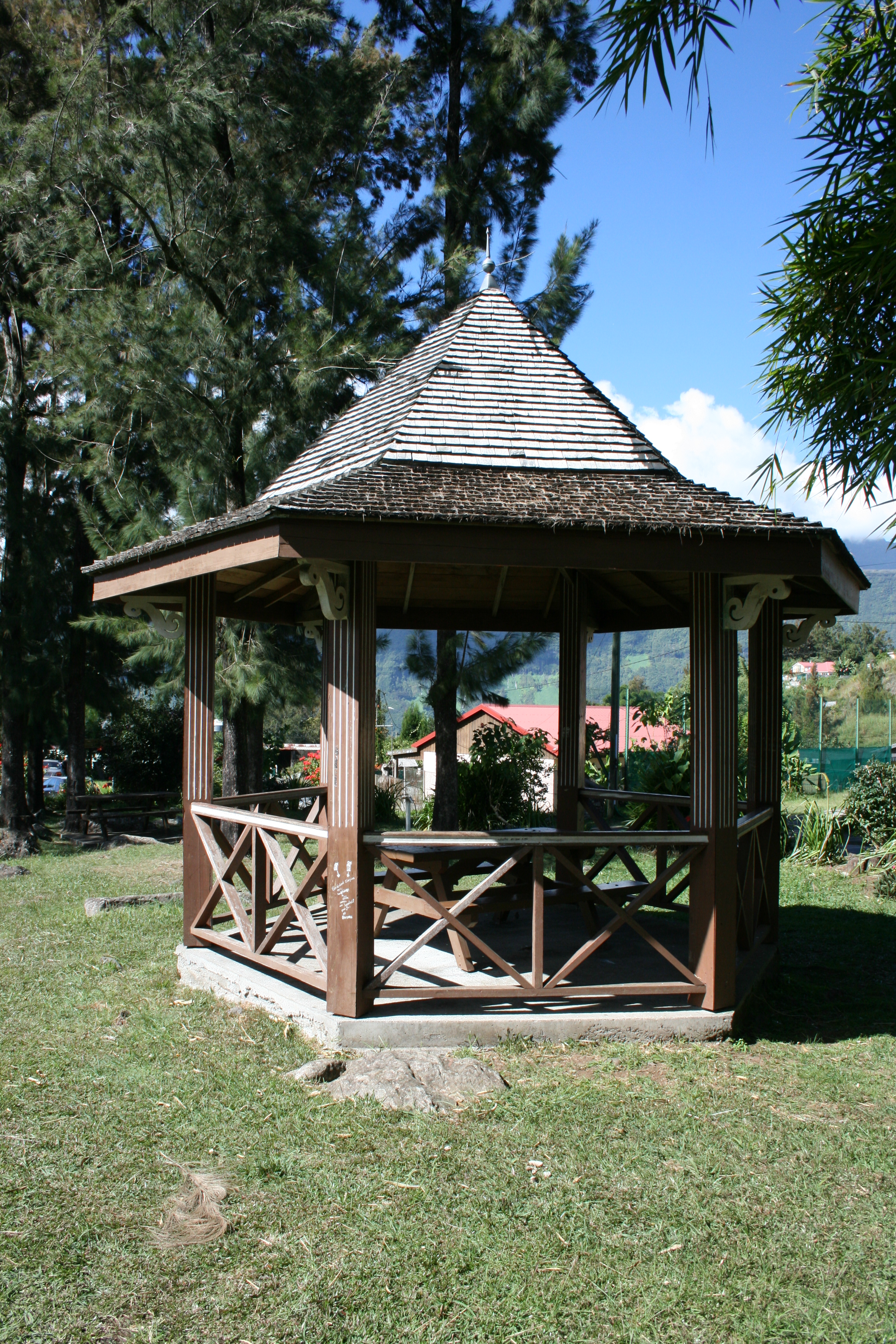 Vue d'un kiosque de pique-nique aménagé au col Carozin, à Salazie de La Réunion.